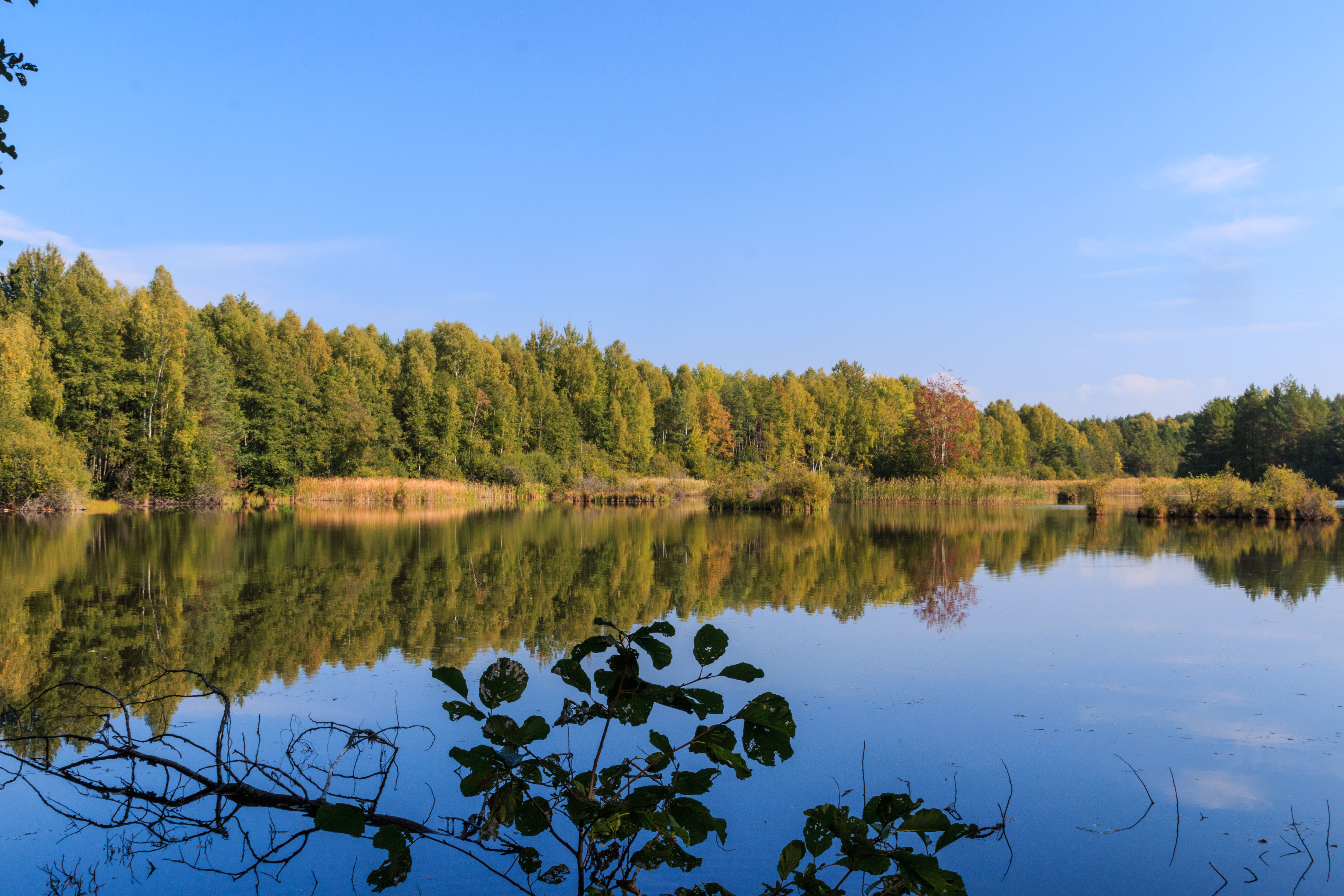 Rybníky pod Hradčanským letištěm Project: Vodstvo.